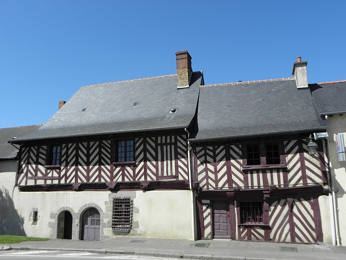 La Commanderie sise en face de l'église de L'Hermitage (35).